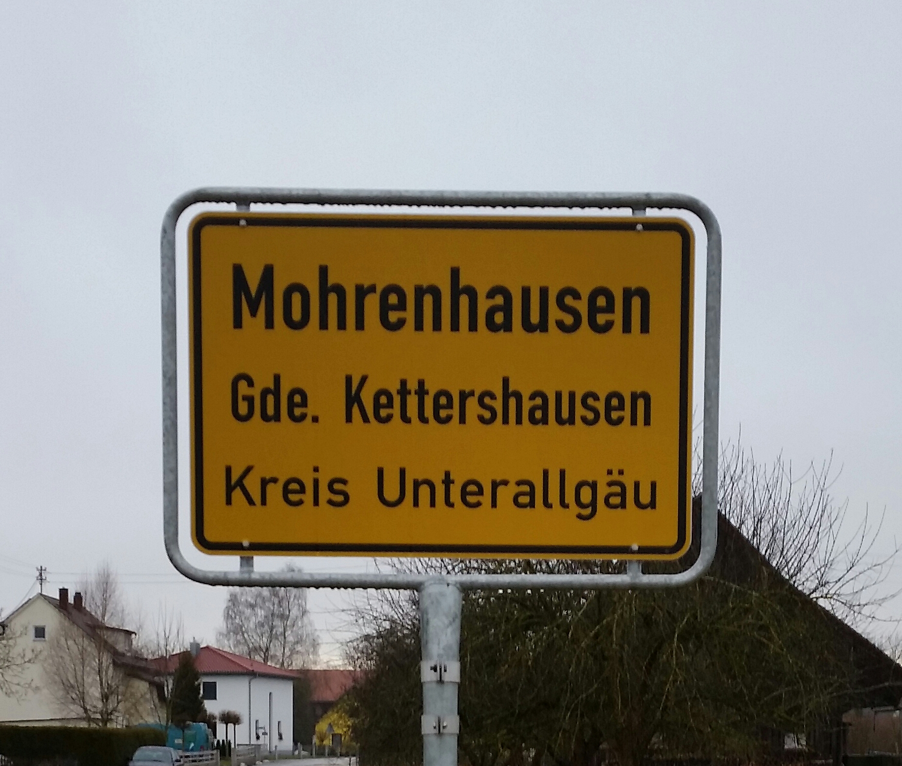 Mohrenhausen bei Kettershausen